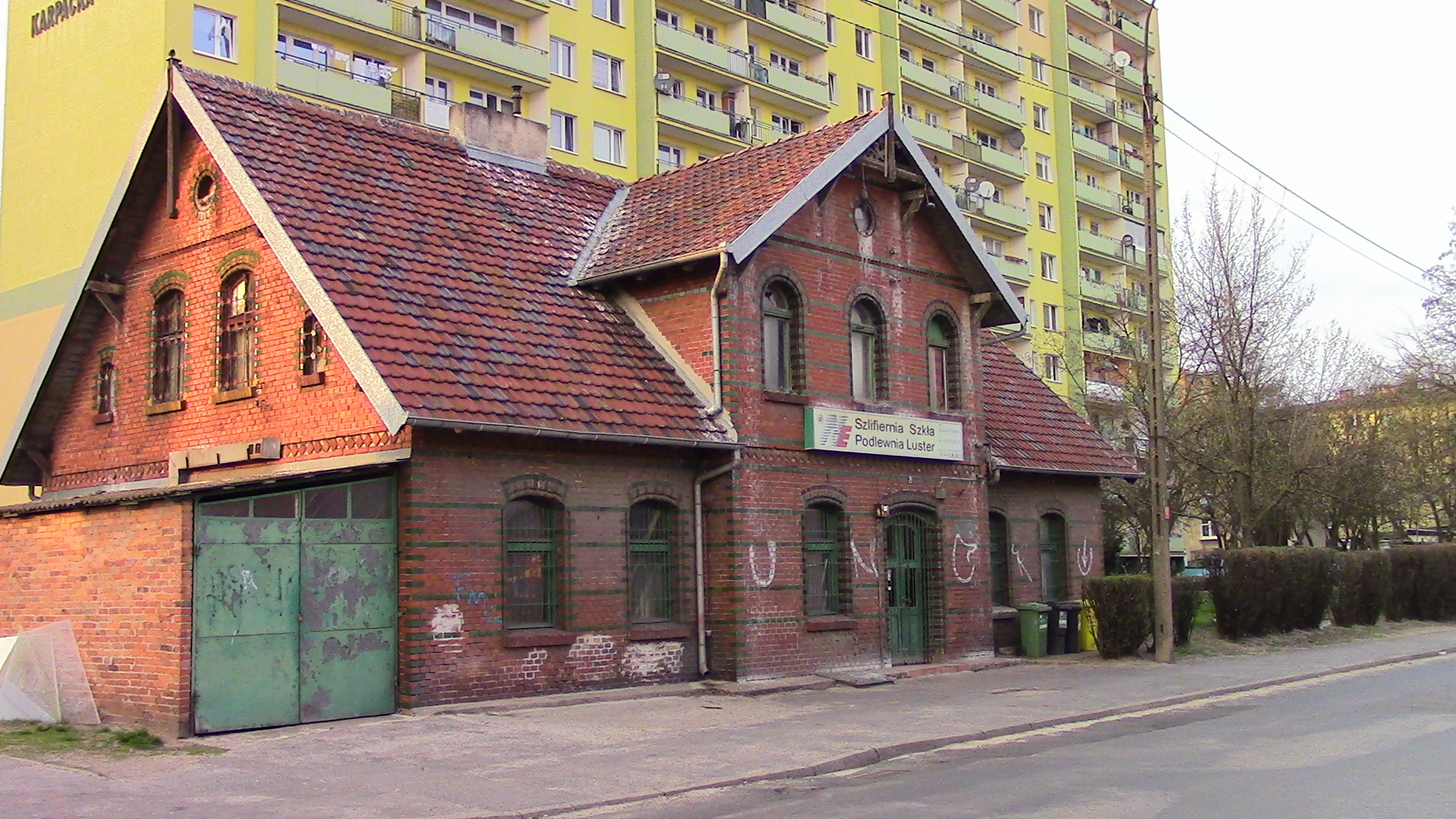 Budynek ul.Ujejskiego 21 Zakład szklarski